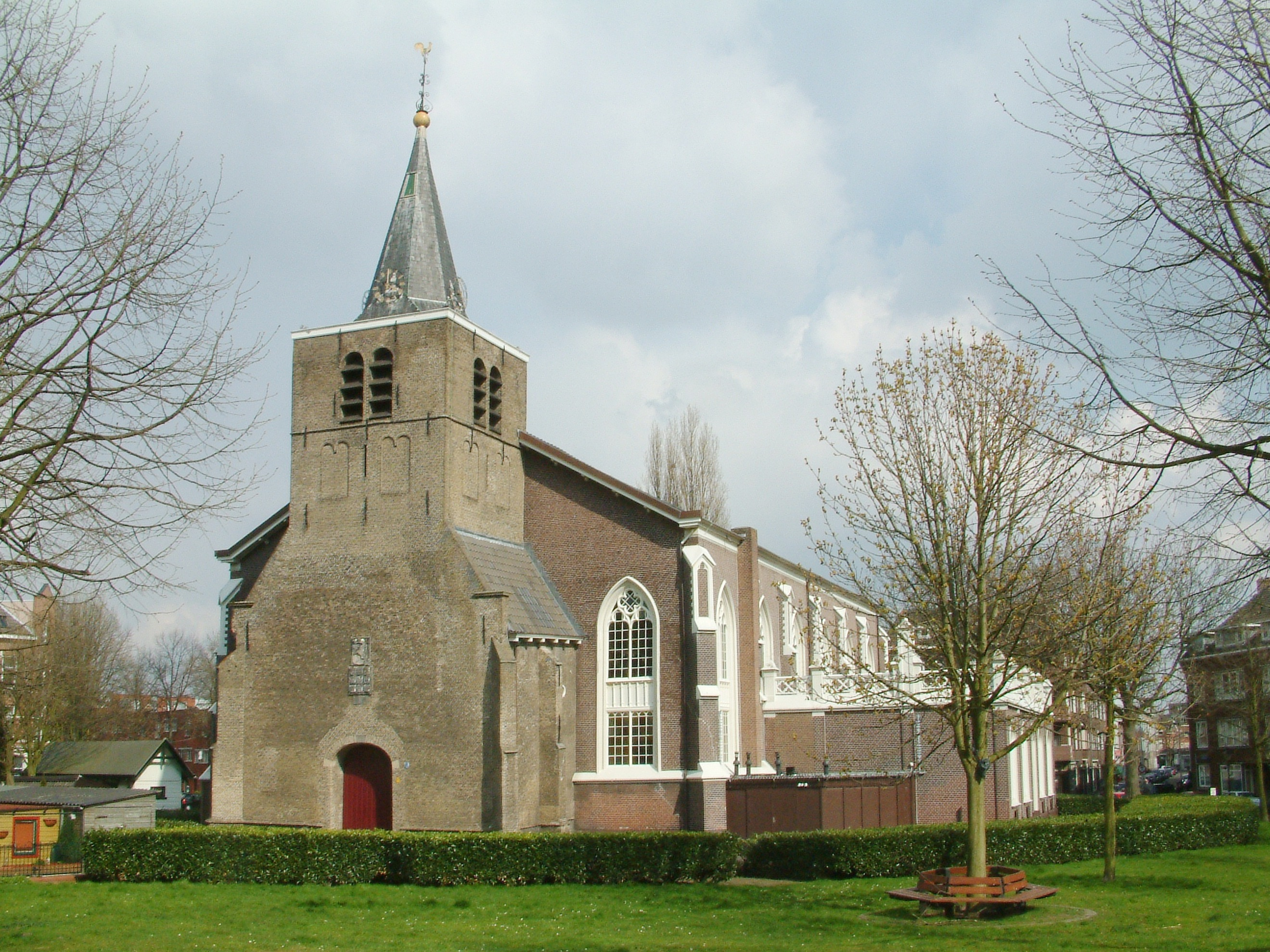 Rotterdam Charlois Oude kerk (1)